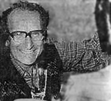 César Milstein, Premio Nobel de la Medicina.